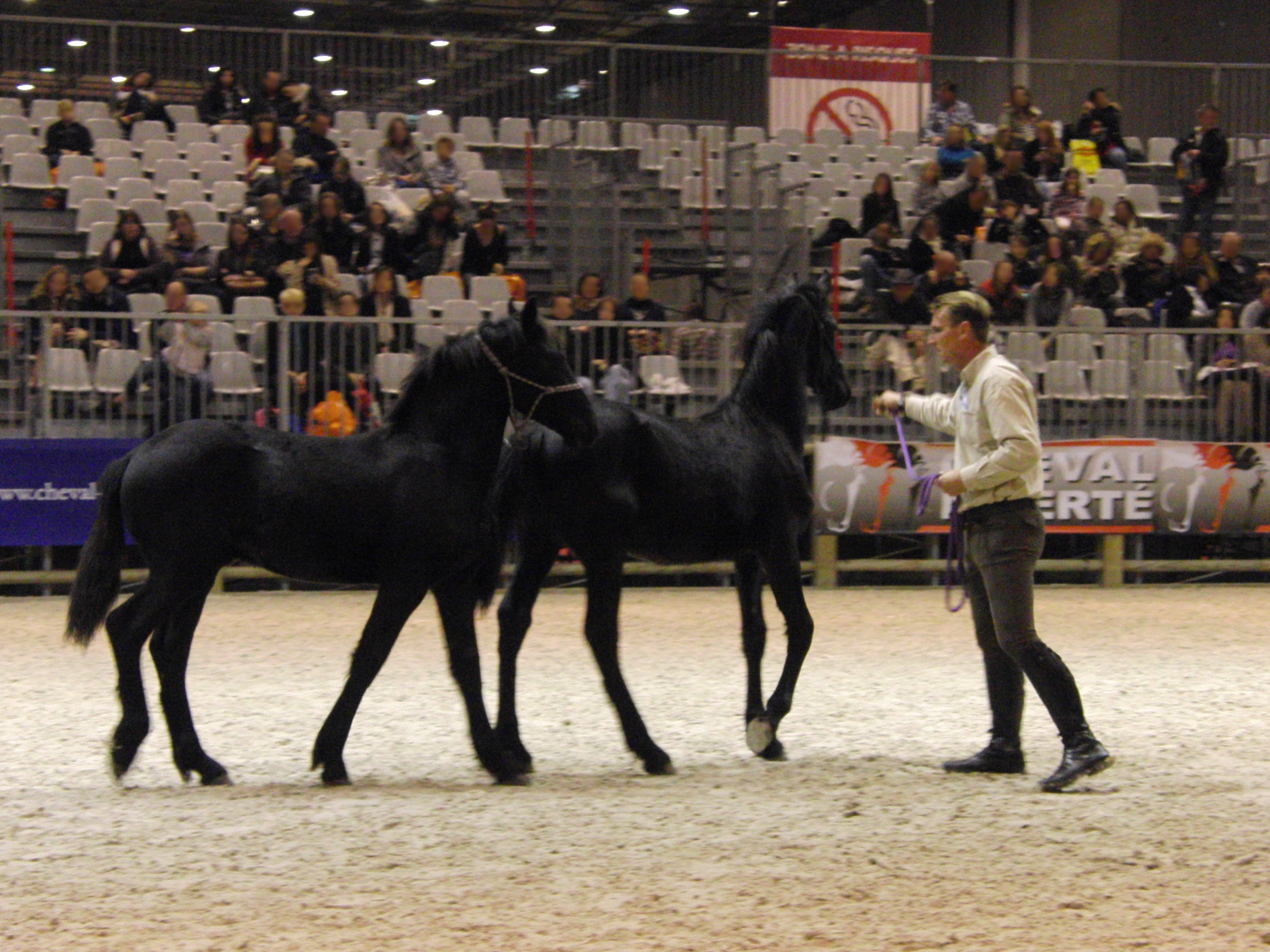 Présentation de poulains arabo-frisons au Salon du cheval de Paris 2014, Parc des expositions de Paris-Nord Villepinte, France